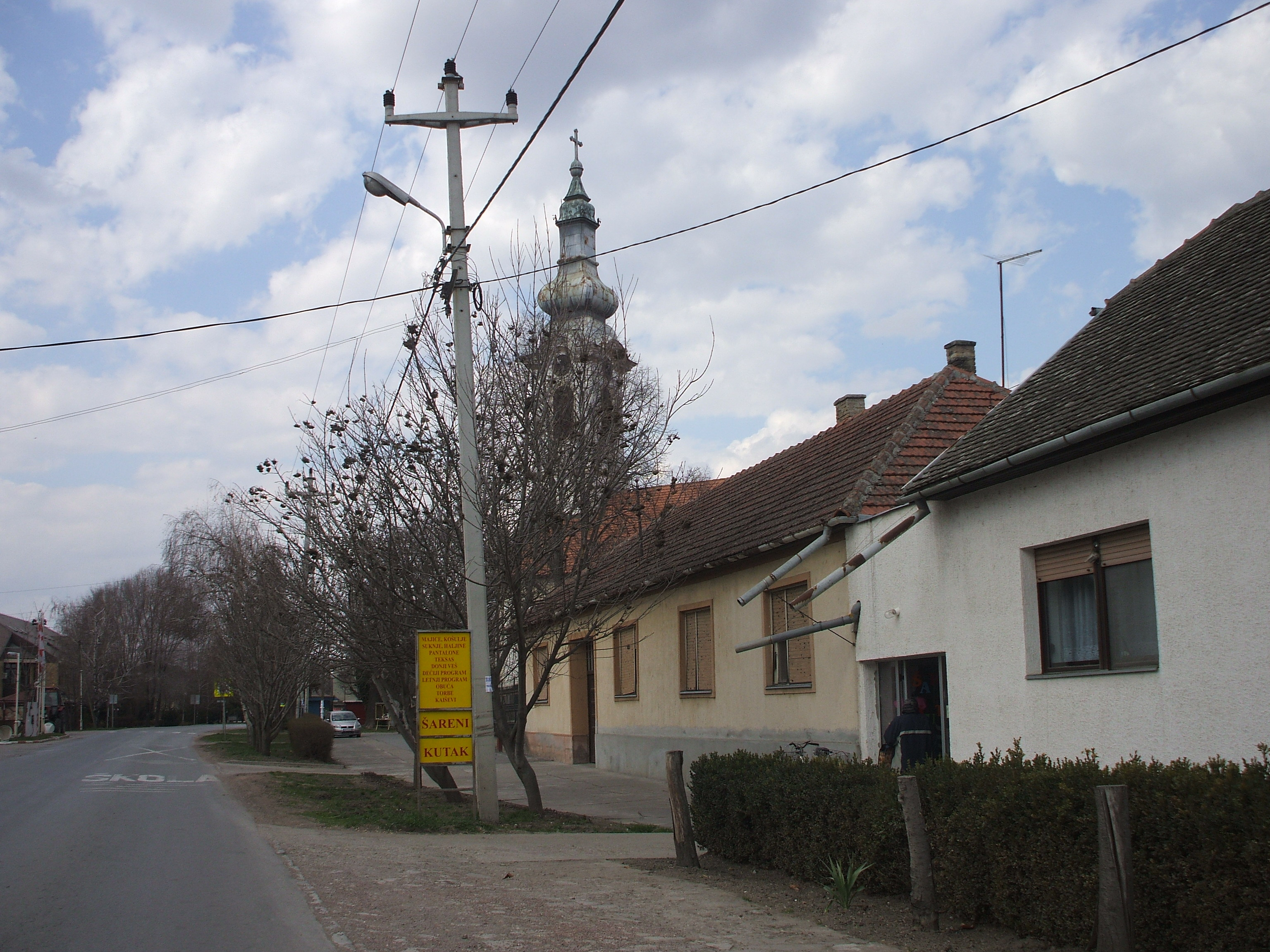 Православна црква у Стапару.